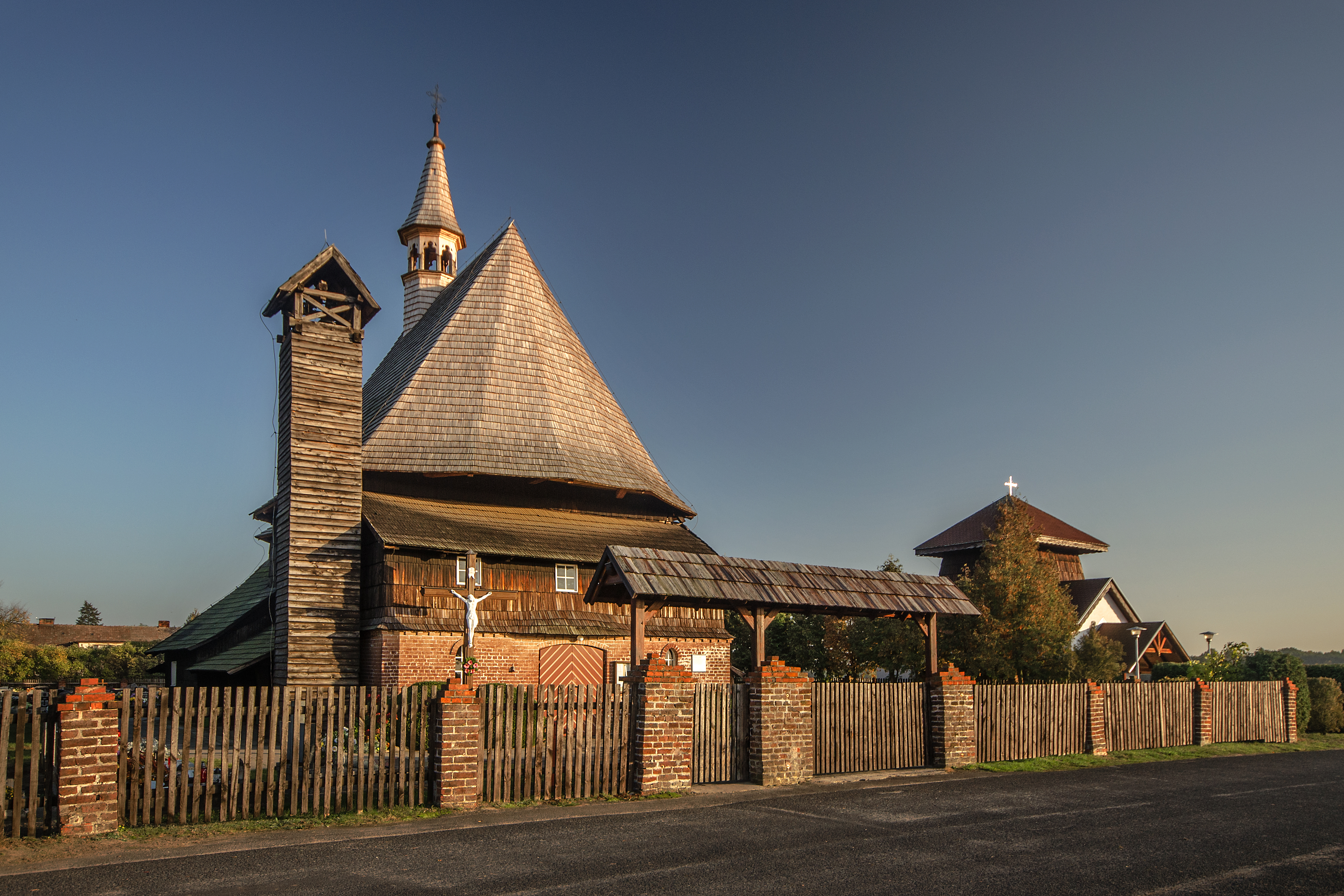 Kolanowice, kościół fil. p.w. św. Barbary, 1678, 1812, ok. 1850, 1934